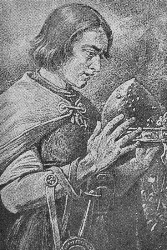 Прысяга князя. Папера, аловак